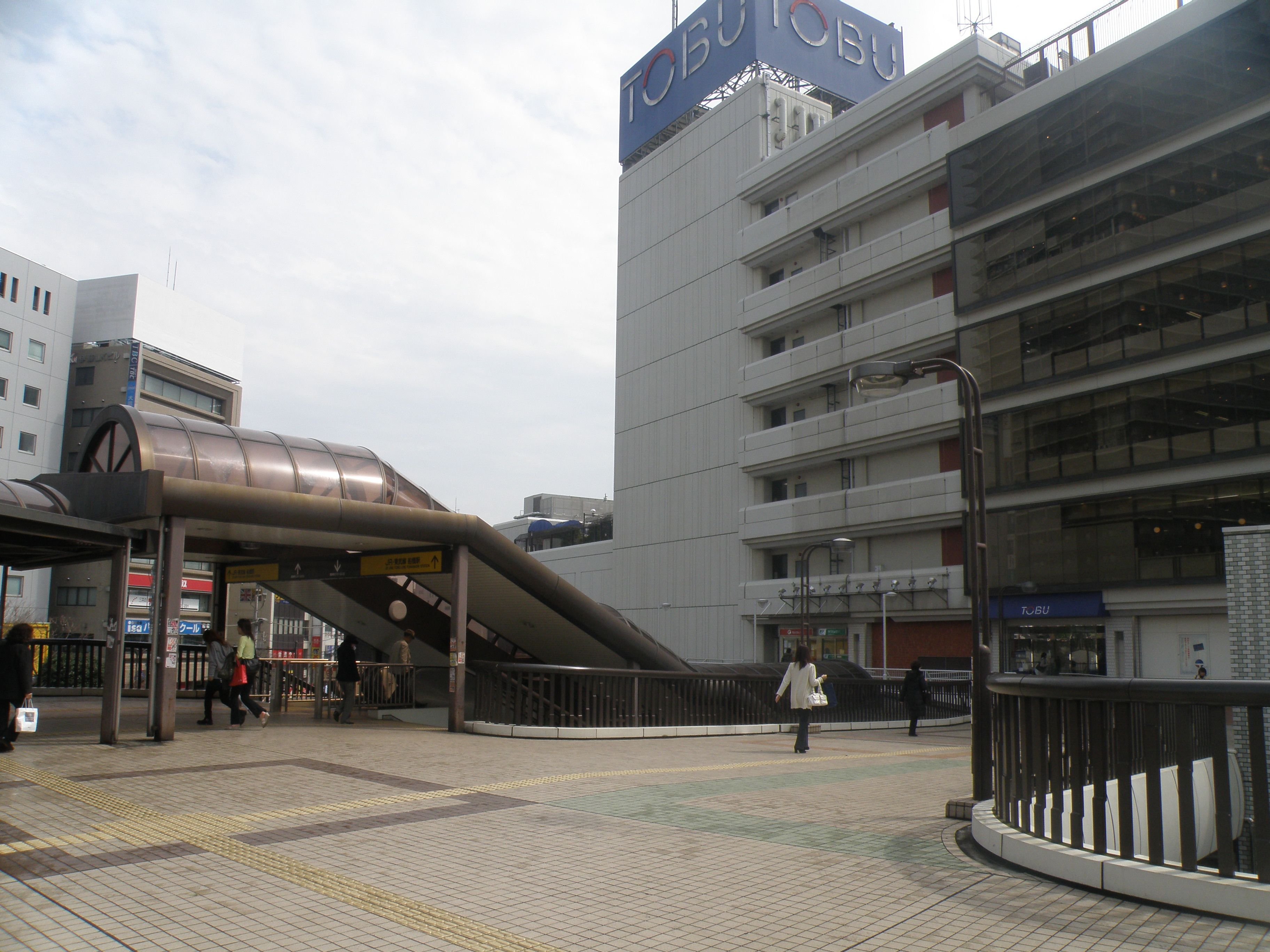 船橋駅